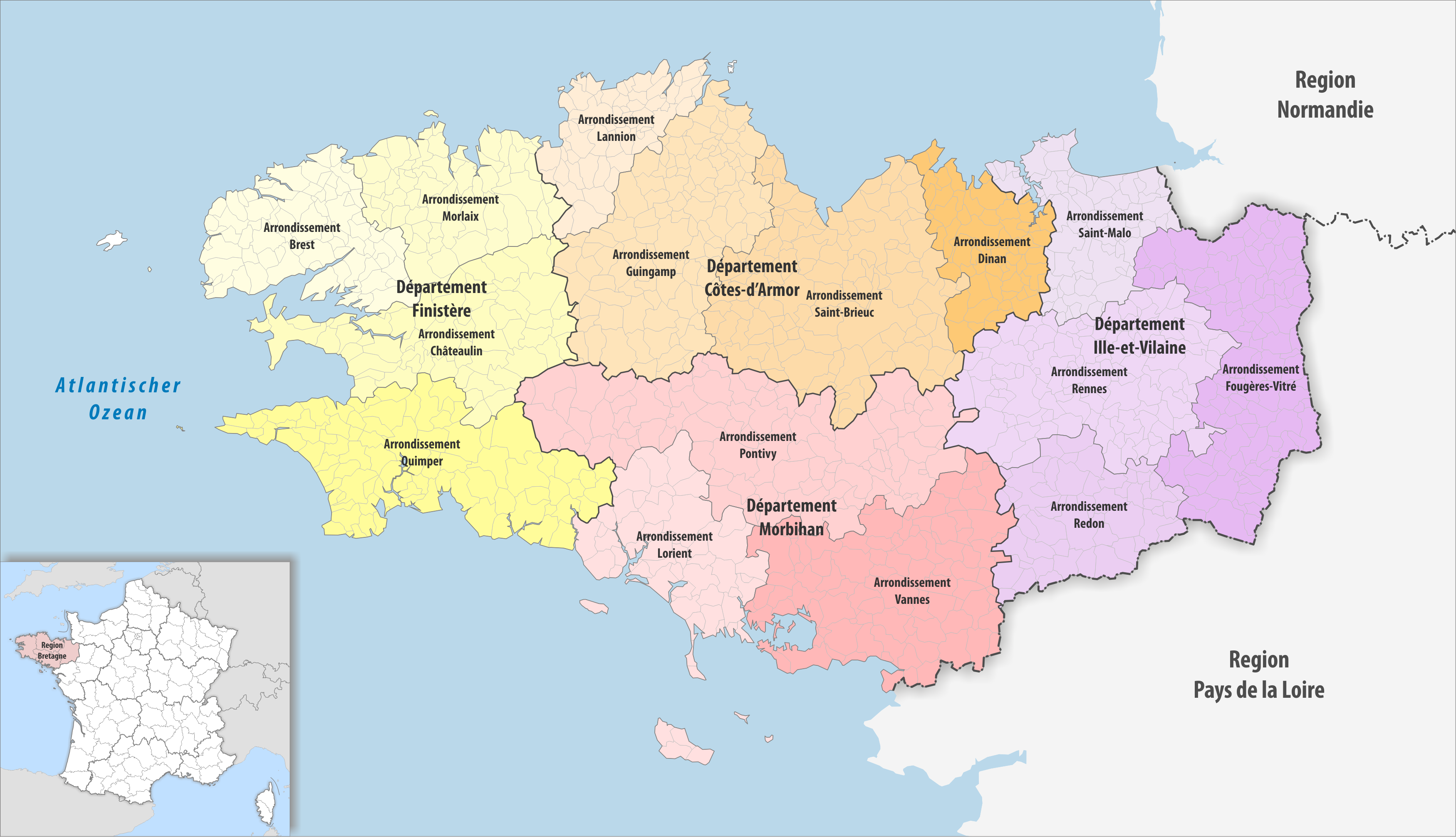 Gemeinden, Arrondissemente und Departemente in der Region Bretagne